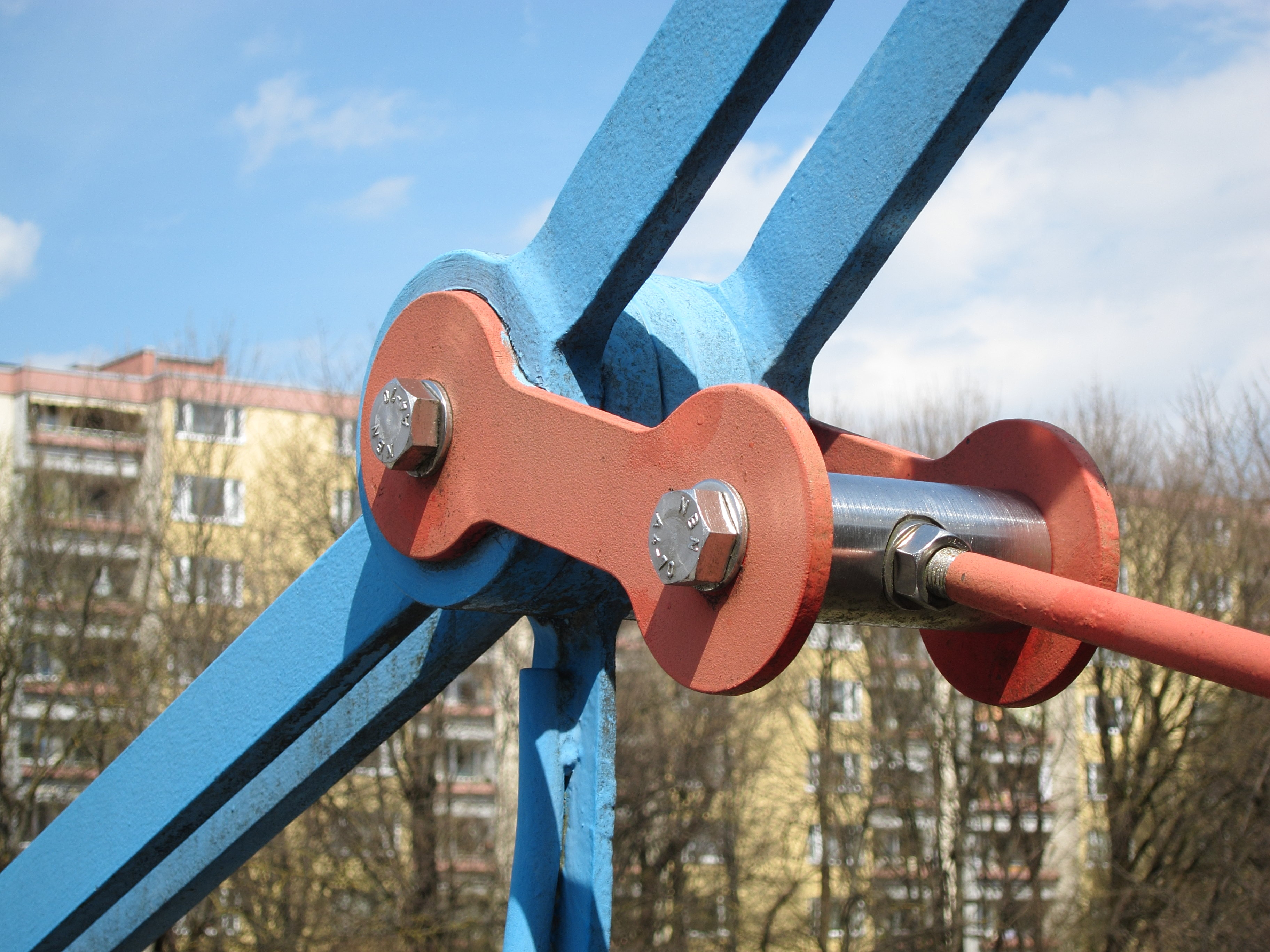 Kettenbrücke über die Ständlerstraße in Neuperlach, Kettengelenk